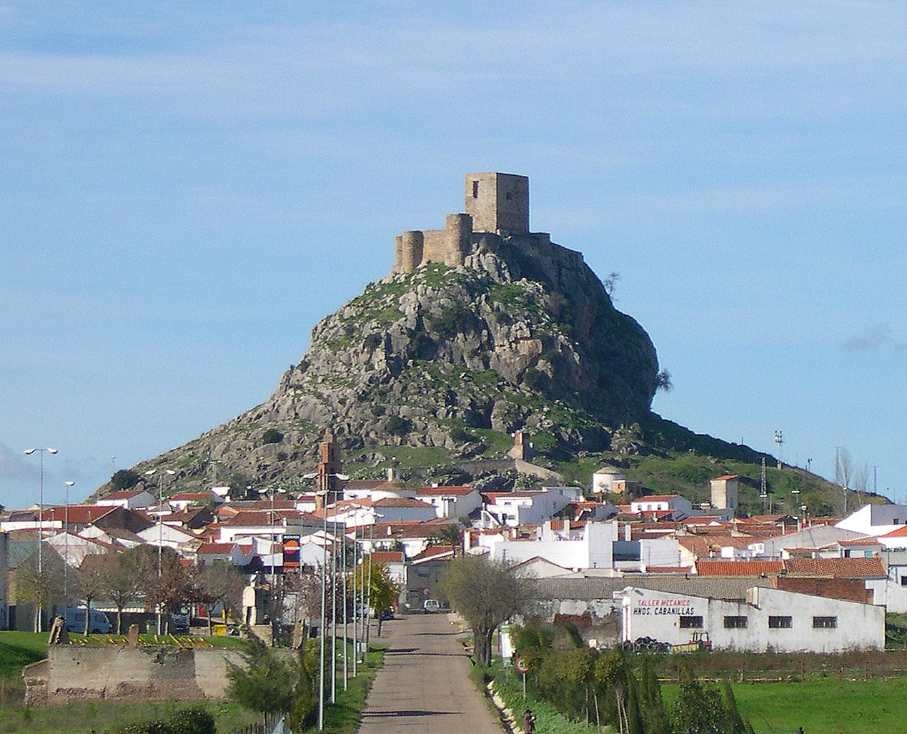 Castillo de Belmez, en la provincia de Córdoba (España)